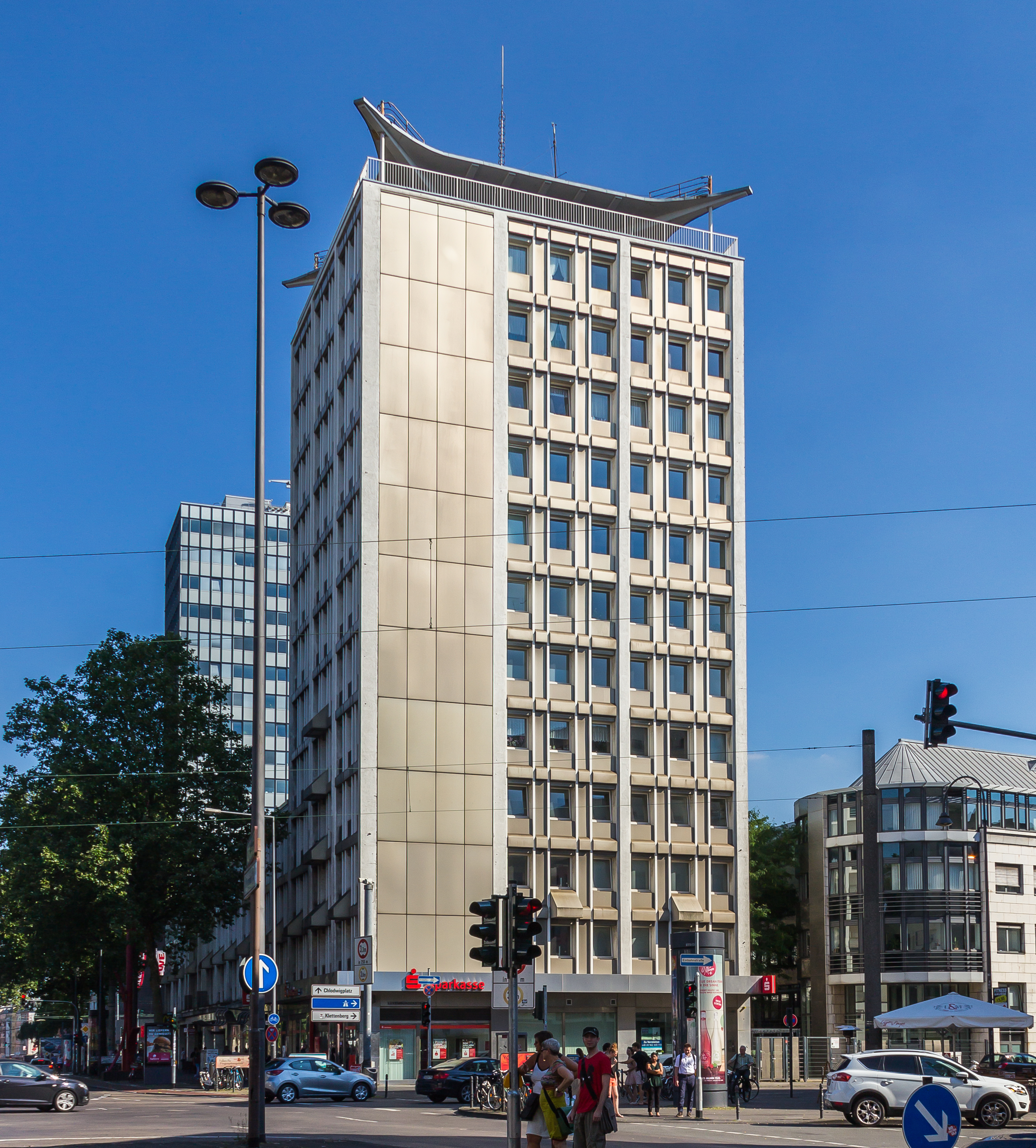 Hochhaus Barbarossaplatz 2, Köln mit einer Filiale der Sparkasse KölnBonn. Architekt: Ernst Nolte. Mit charakteristischem Schwalbenschwanzdach